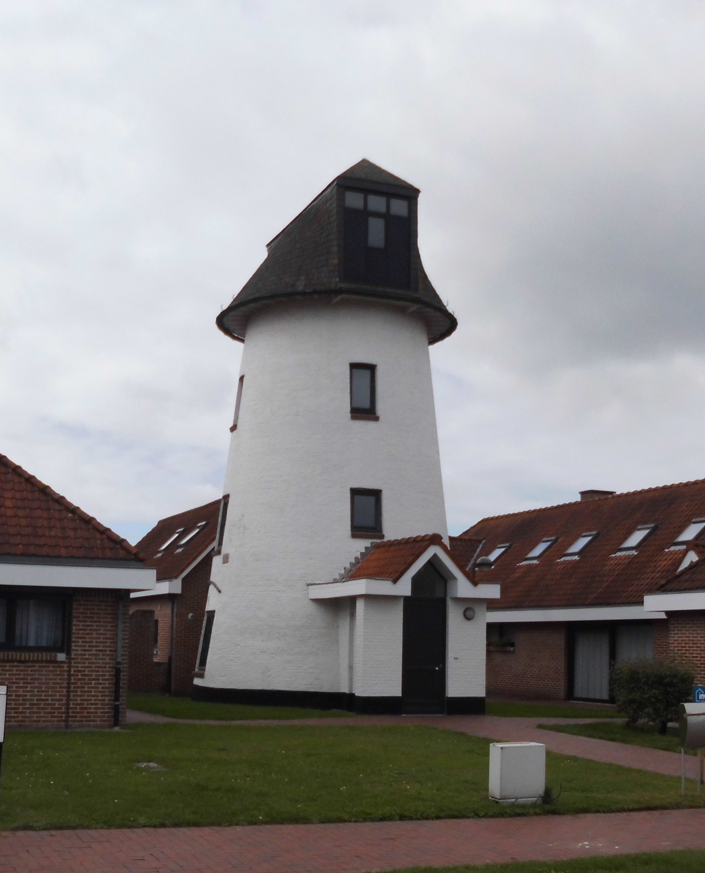 Dorpsmolen of Molen Lievens - Nieuwe Weg - Sijsele - Damme - West-Vlaanderen - België